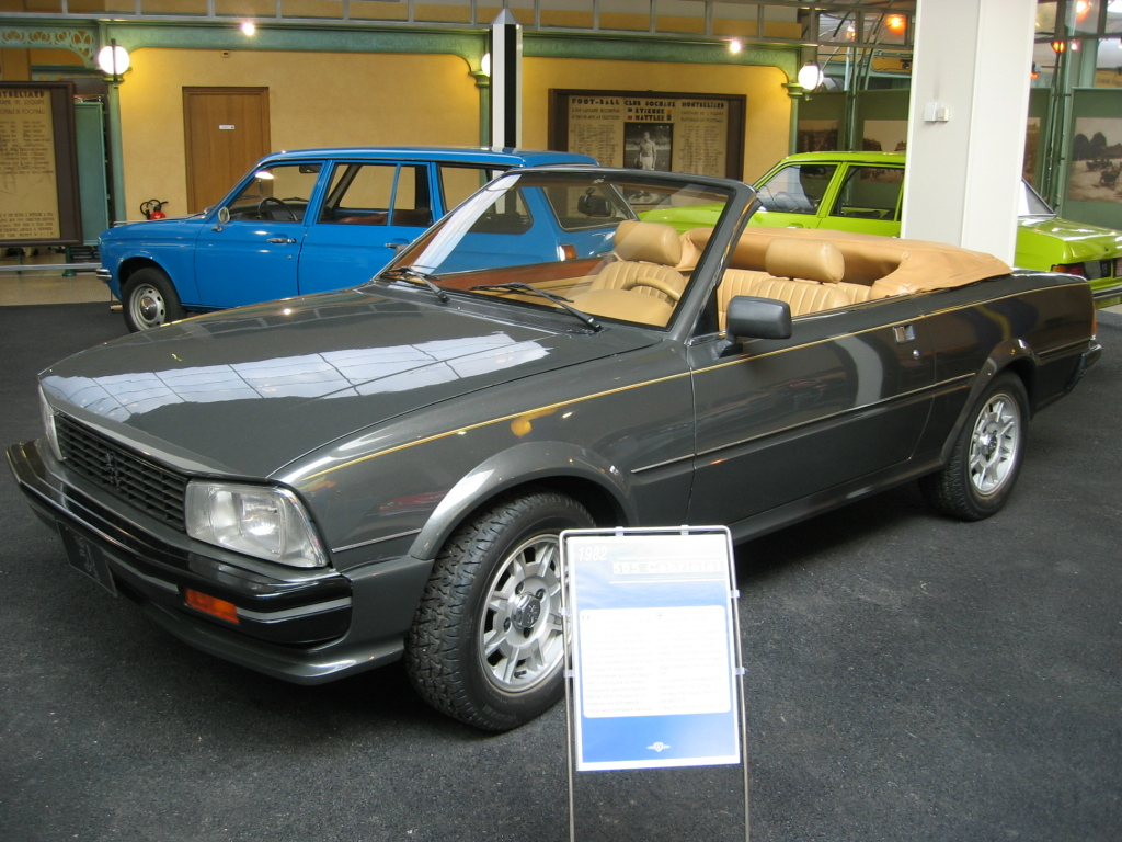 Prototype Peugeot 505 cab - musée Peugeot Sochaux